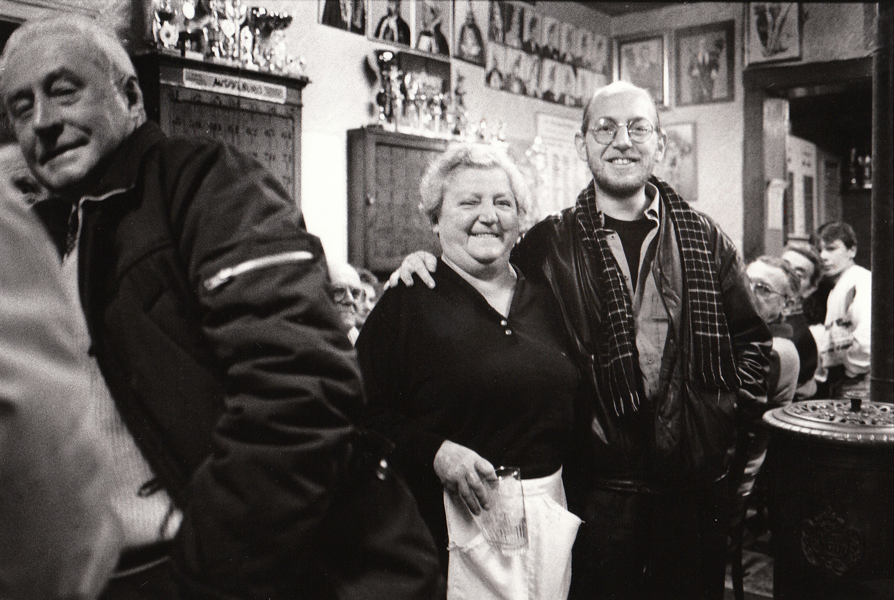 Eriek Verpale, Vlaams schrijver